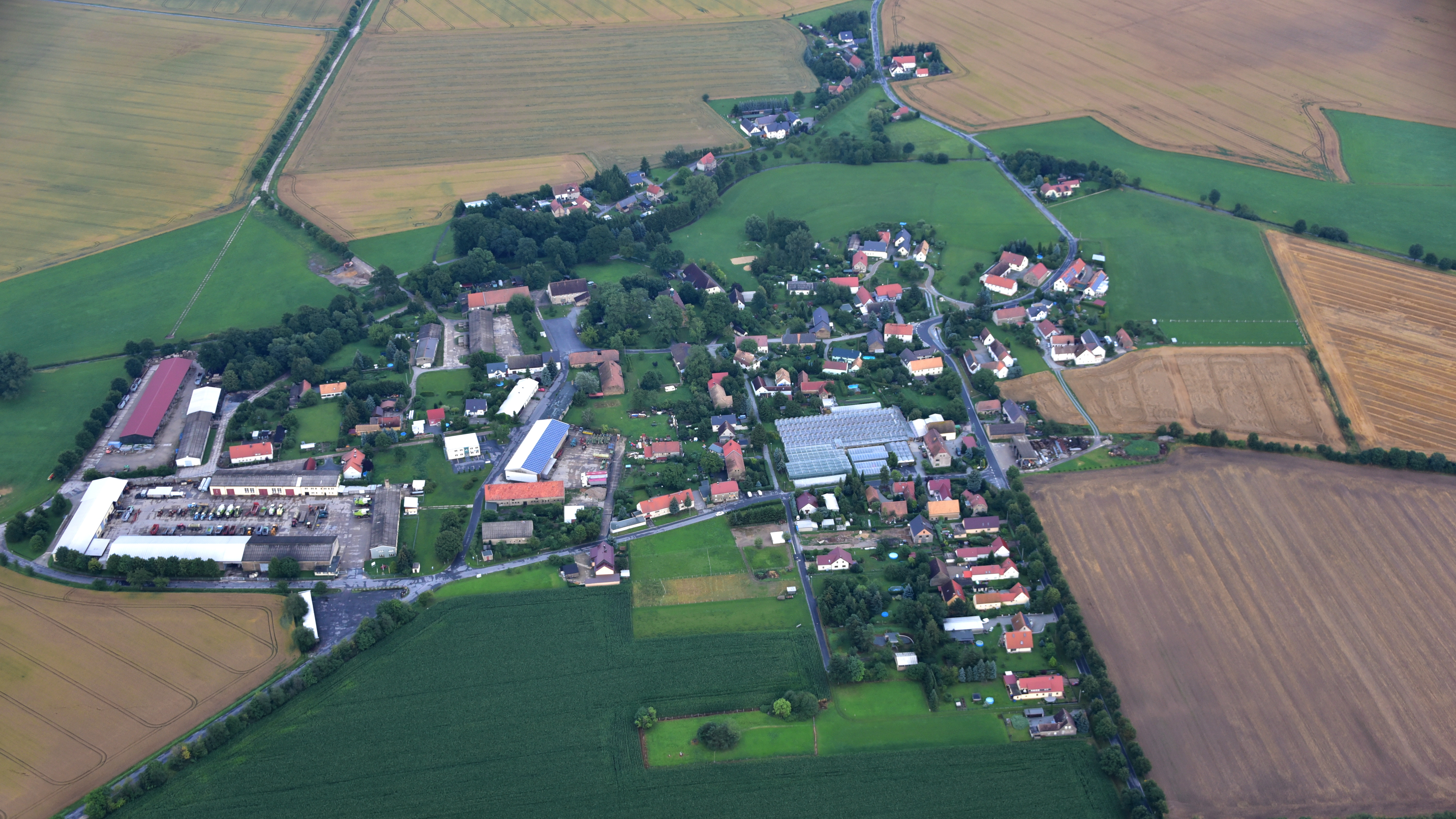 Preititz, Luftaufnahme (2017) Hornjoserbsce: Powětrowy wobraz Přiwćic (2017)